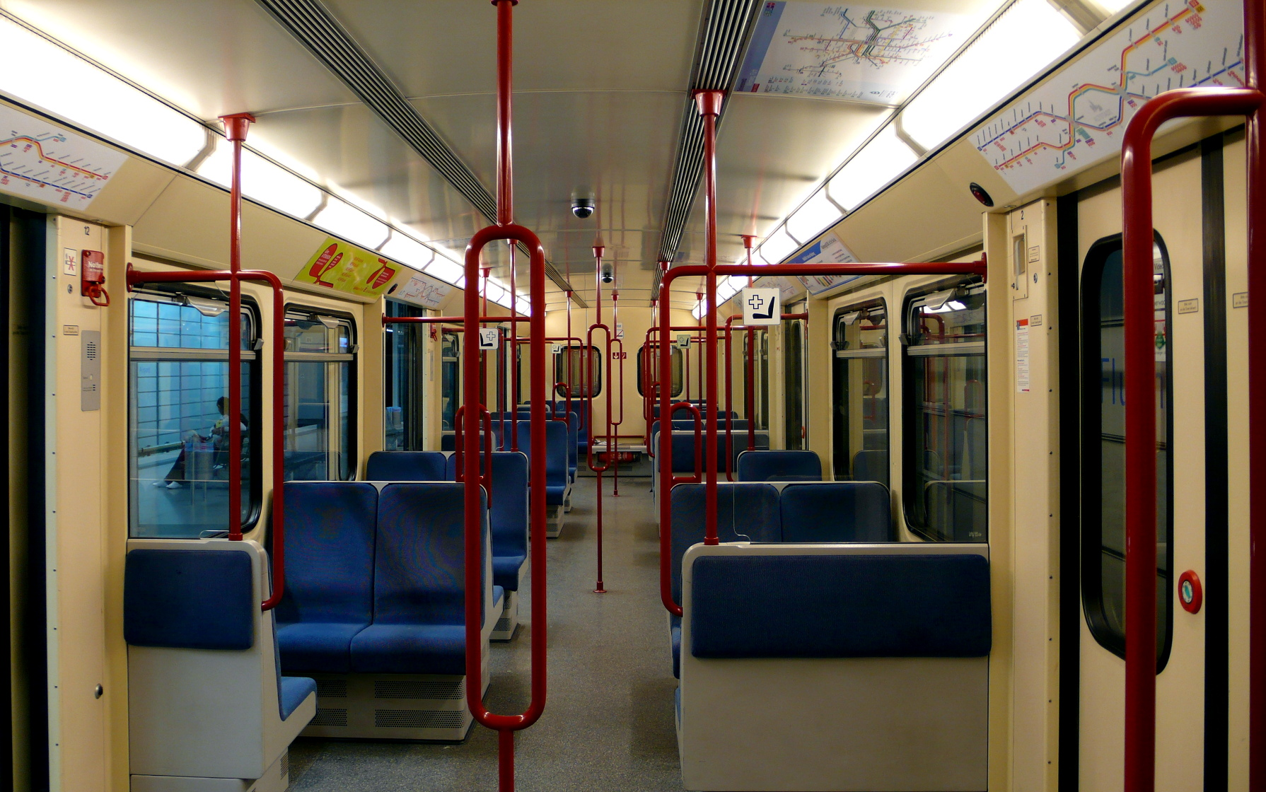 Doppeltriebwagen 551/552 der U-Bahn Nürnberg im Bahnhof Flughafen, Innenraumaufnahme